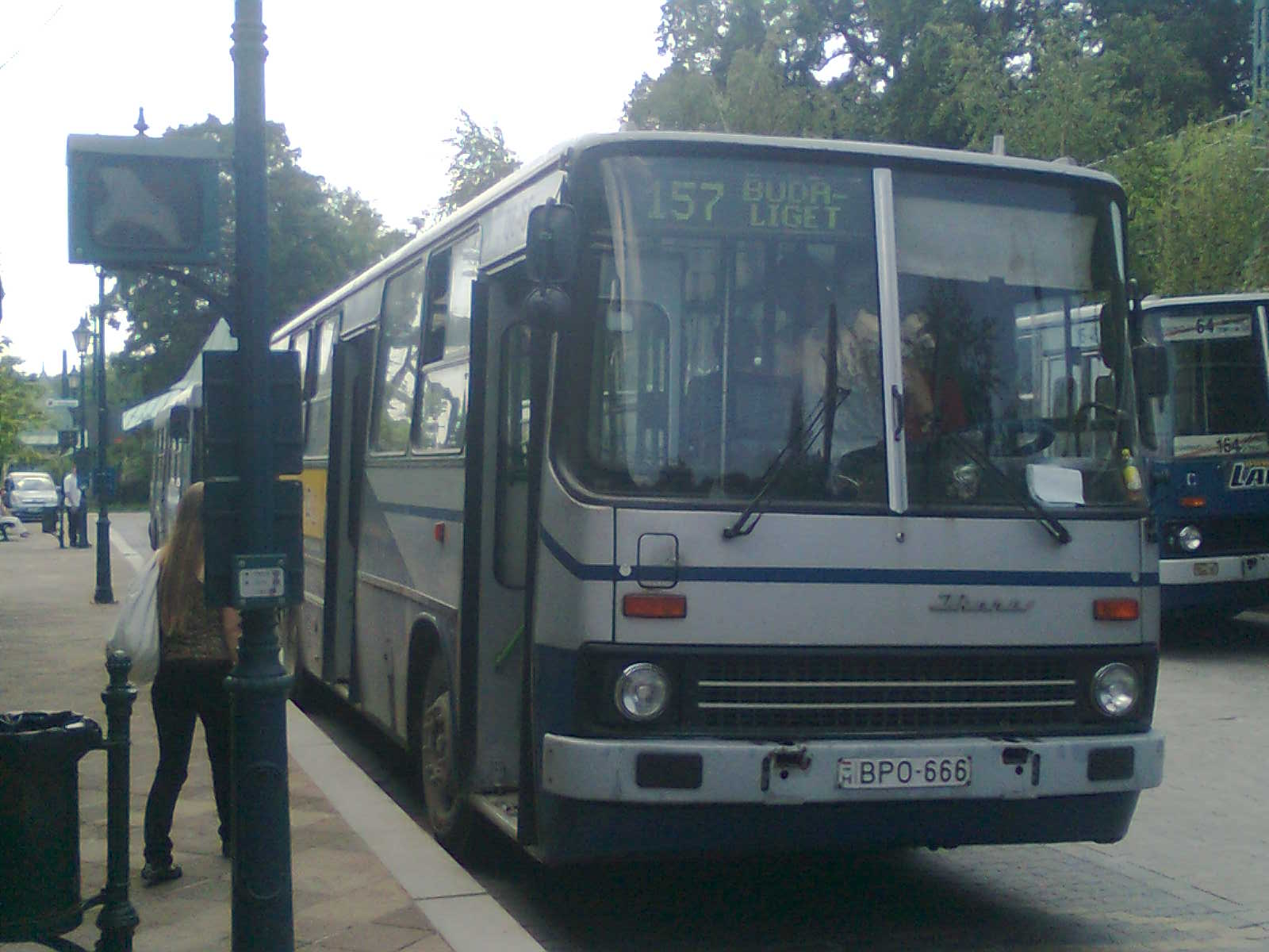 157-es busz (Budapest)